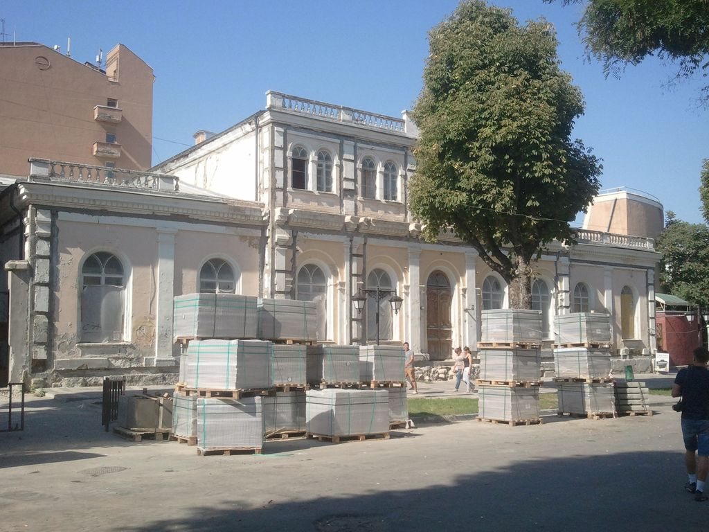 Заброшенное здание депутатского дворянского собрания в Симферополе на ул. Горького